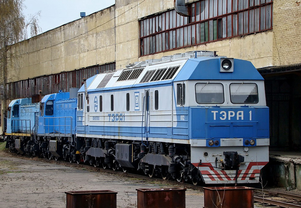 ТЭРА1